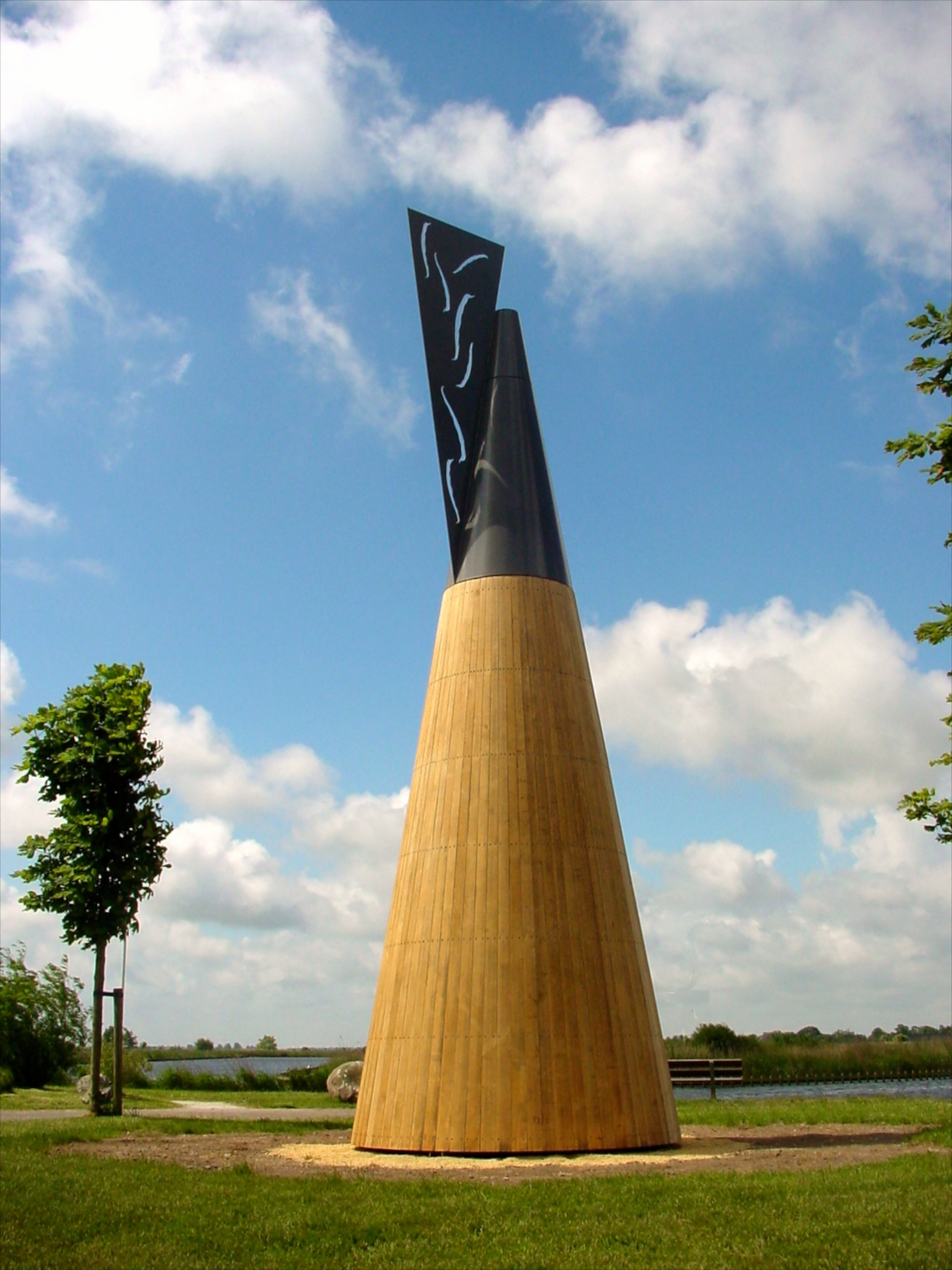 de Richting